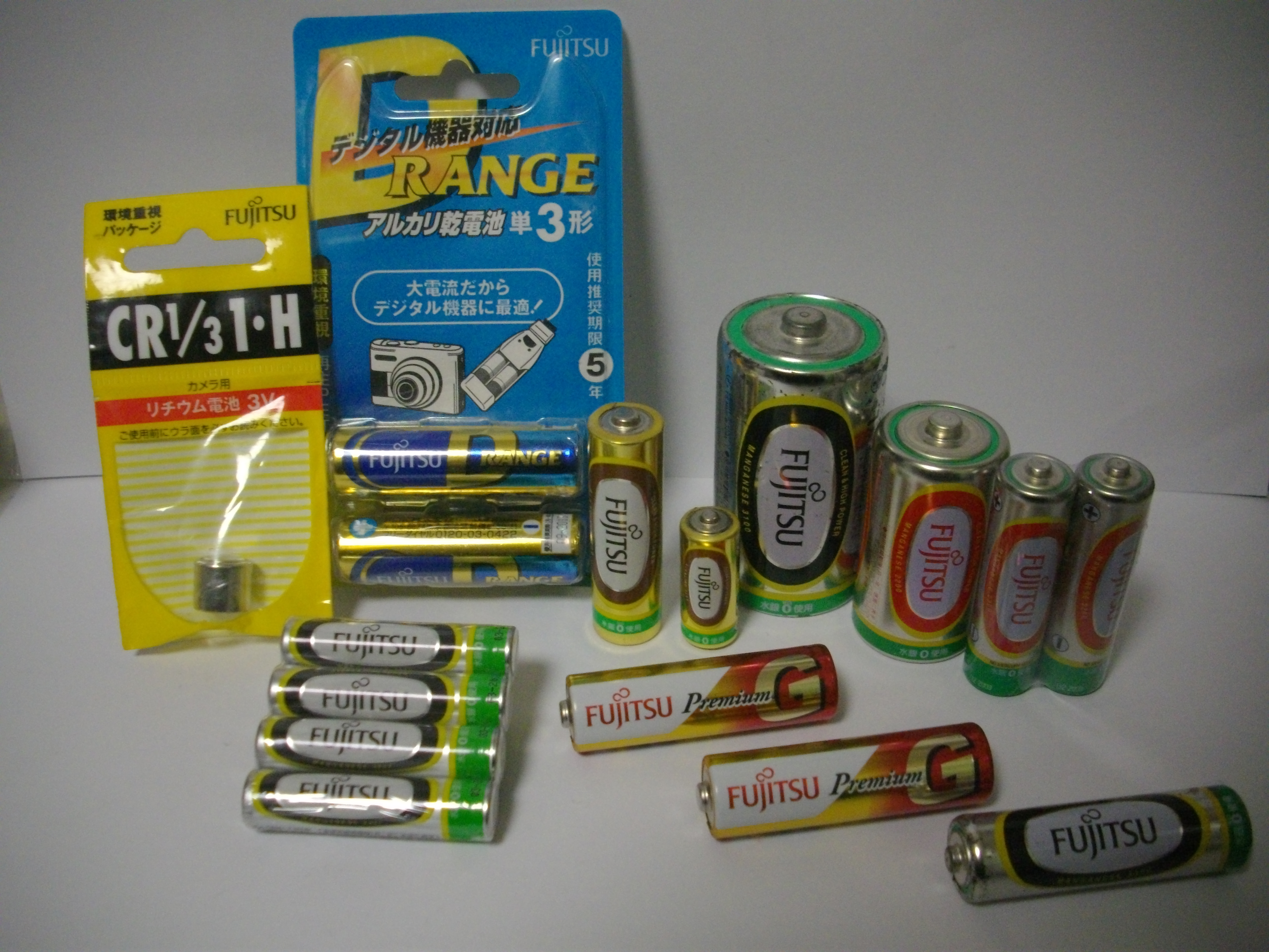 FDK製の各種市販用電池。富士通ブランドである。